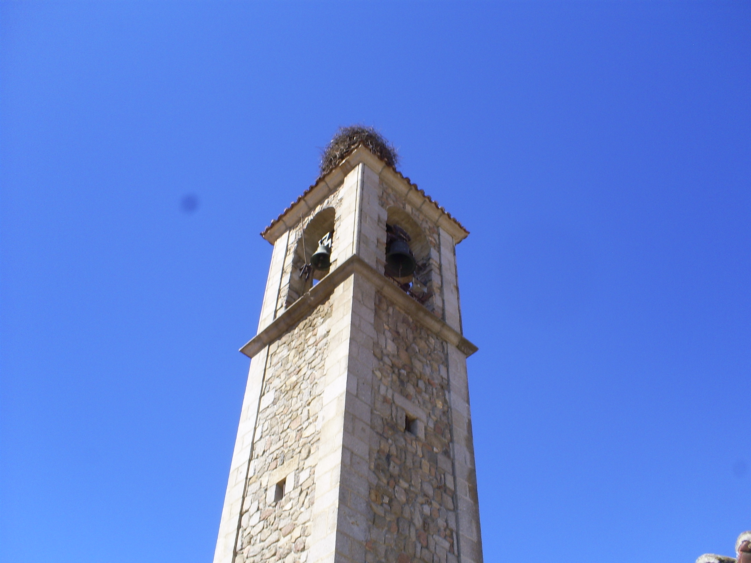 iglesia de santibañez de bejar